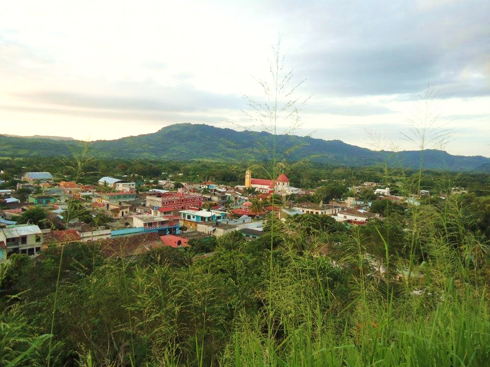 Podemos apreciar colipa como amante de la naturaleza.